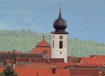 Der Kirchturm von Langenleiten mit dem hohen Mansarddach der östlichen Langhauserweiterung